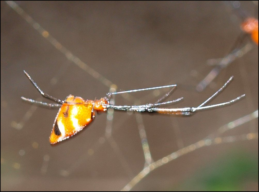 Argyrodes zonatus sur toile de Nephile